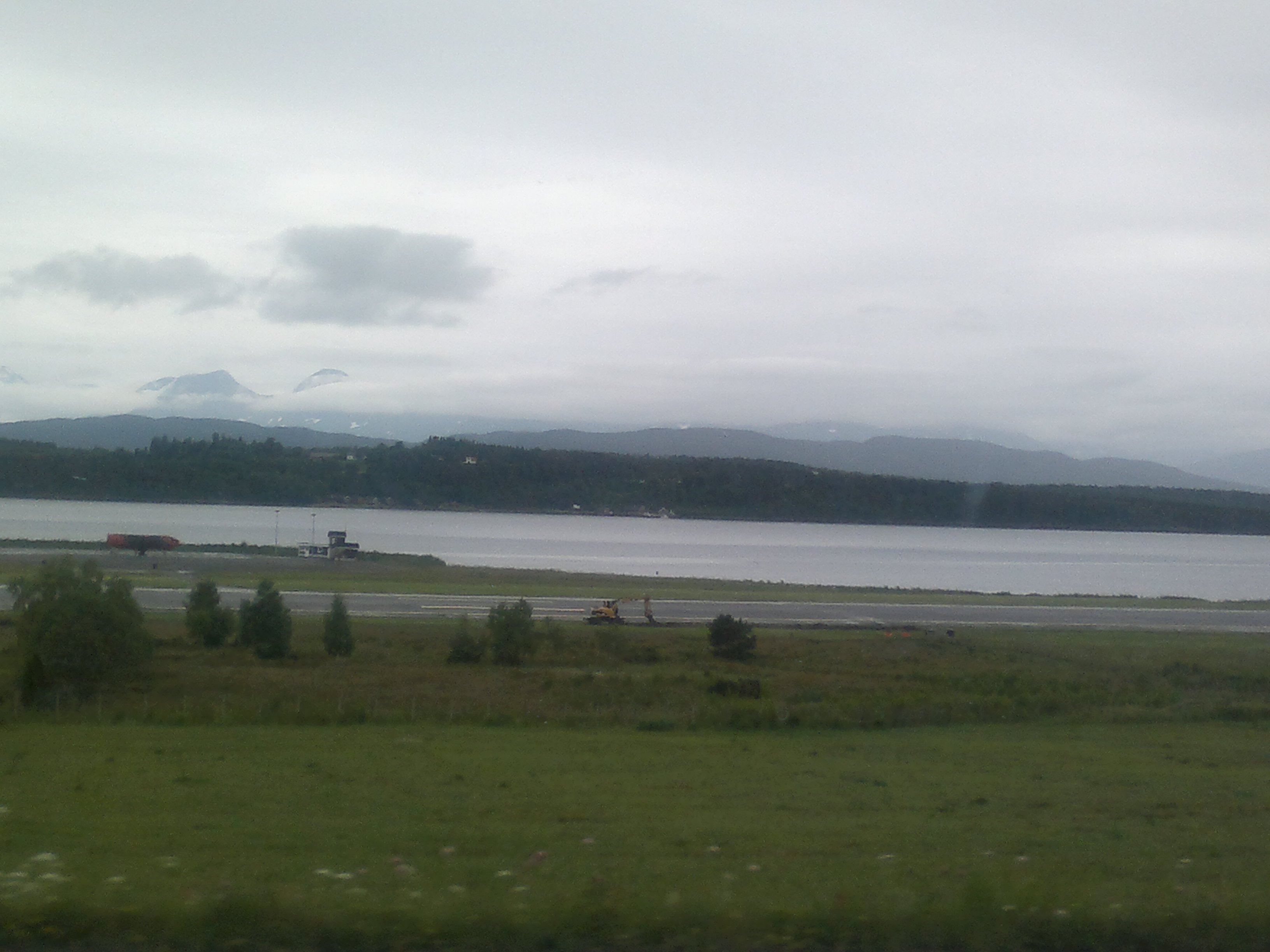 Molden lentoasema Molden kunnassa, Norjassa.